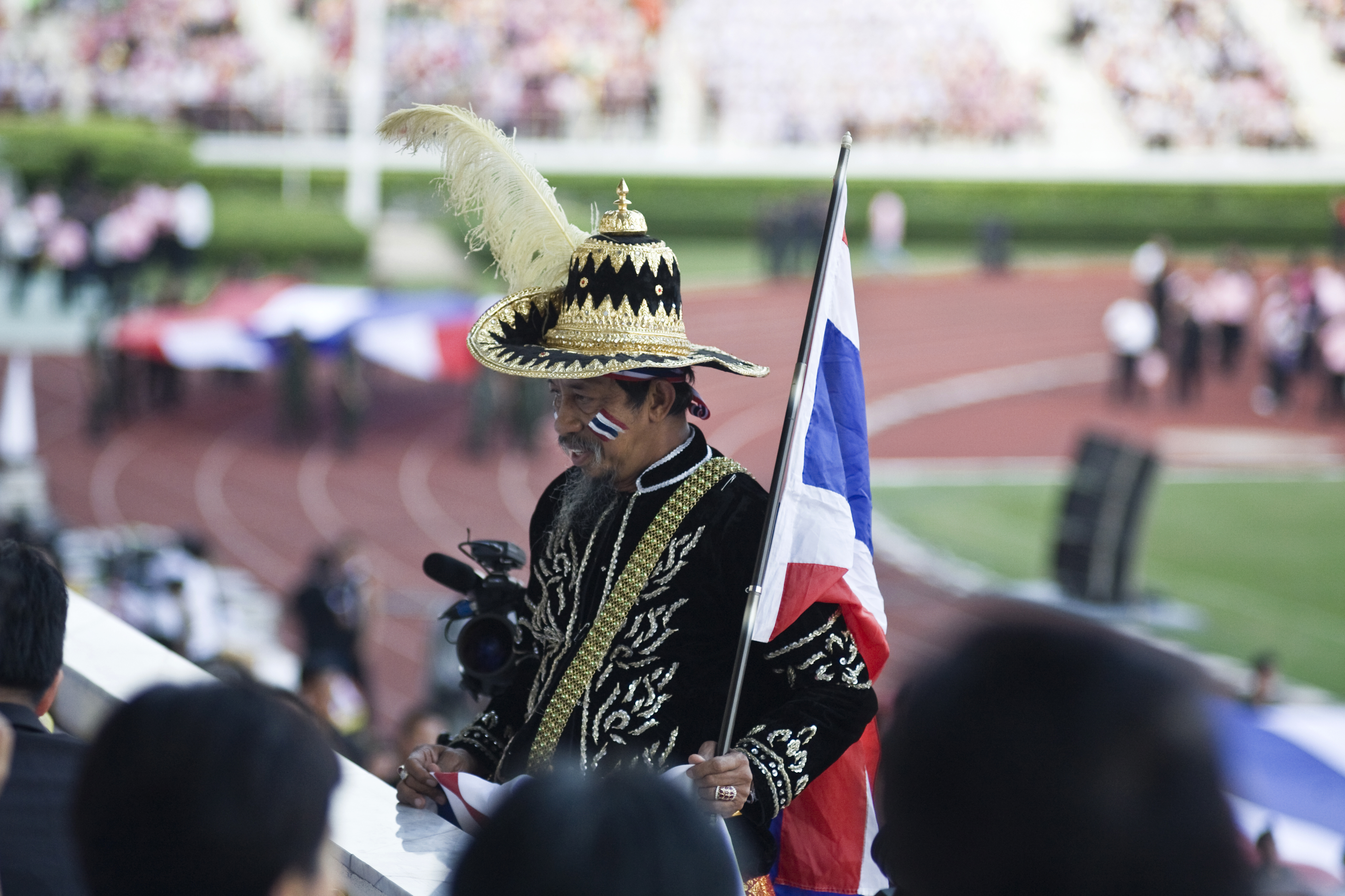 ถั่วแระ เชิญยิ้ม / นายกรัฐมนตรี กล่าวขอบคุณประชาชนทุกจังหวัดและร่วมร้องเพลงชาติตามโครงการไทยเข้มแข็ง ณ สนามศุภชลาศัยกรีฑาสถานแห่งชาติ 4ธันวาคม2552 (The Official Site of The Prime Minister of Thailand Photo by พีรพัฒน์ วิมลรังครัตน์)